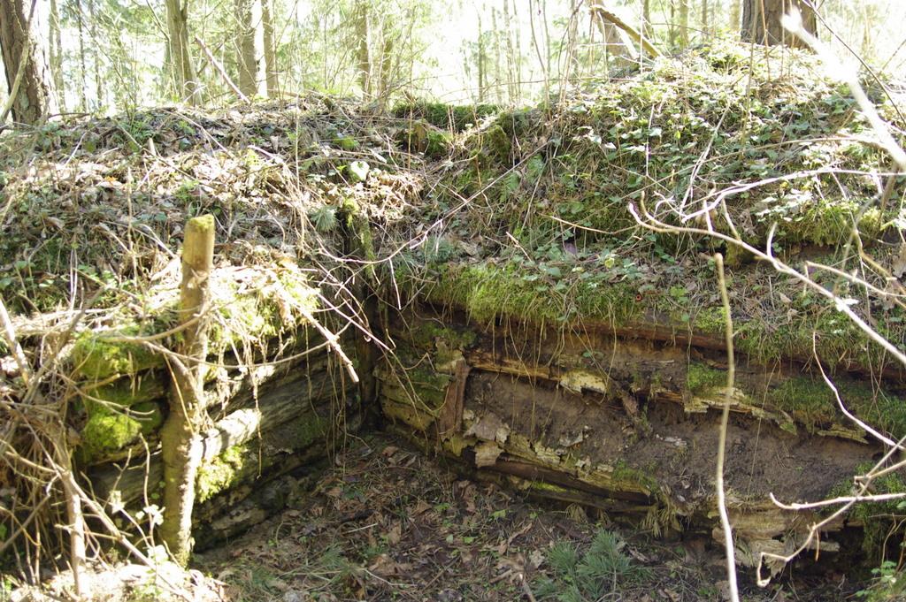 Mummassaares taastatud Rebase pataljoni kaevikud Sinimägede lahingu ajast. Taastamata osa.